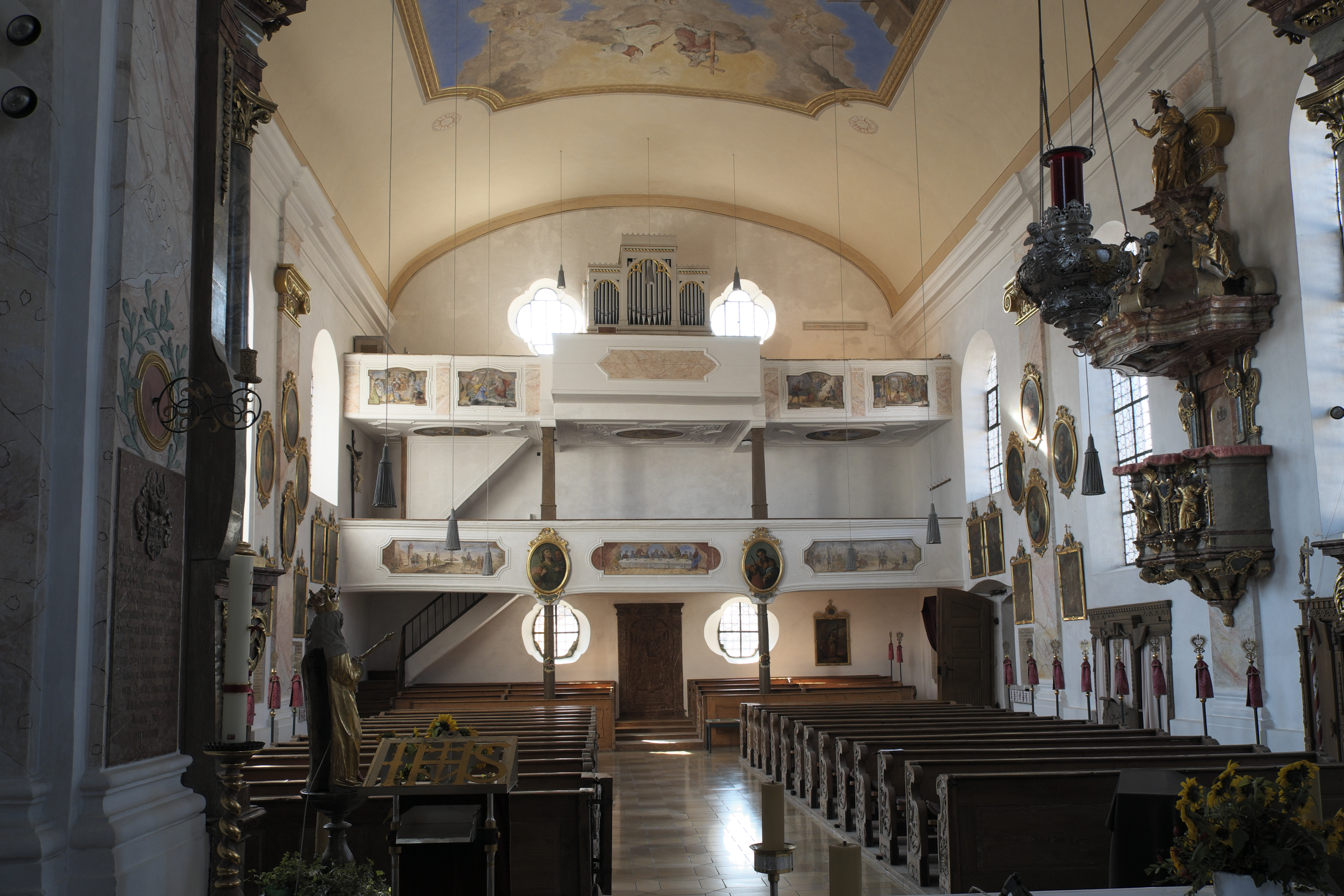 Katholische Pfarrkirche Sankt Peter und Paul in Oberigling (Igling) im Landkreis Landsberg am Lech (Bayern/Deutschland), Innenraum